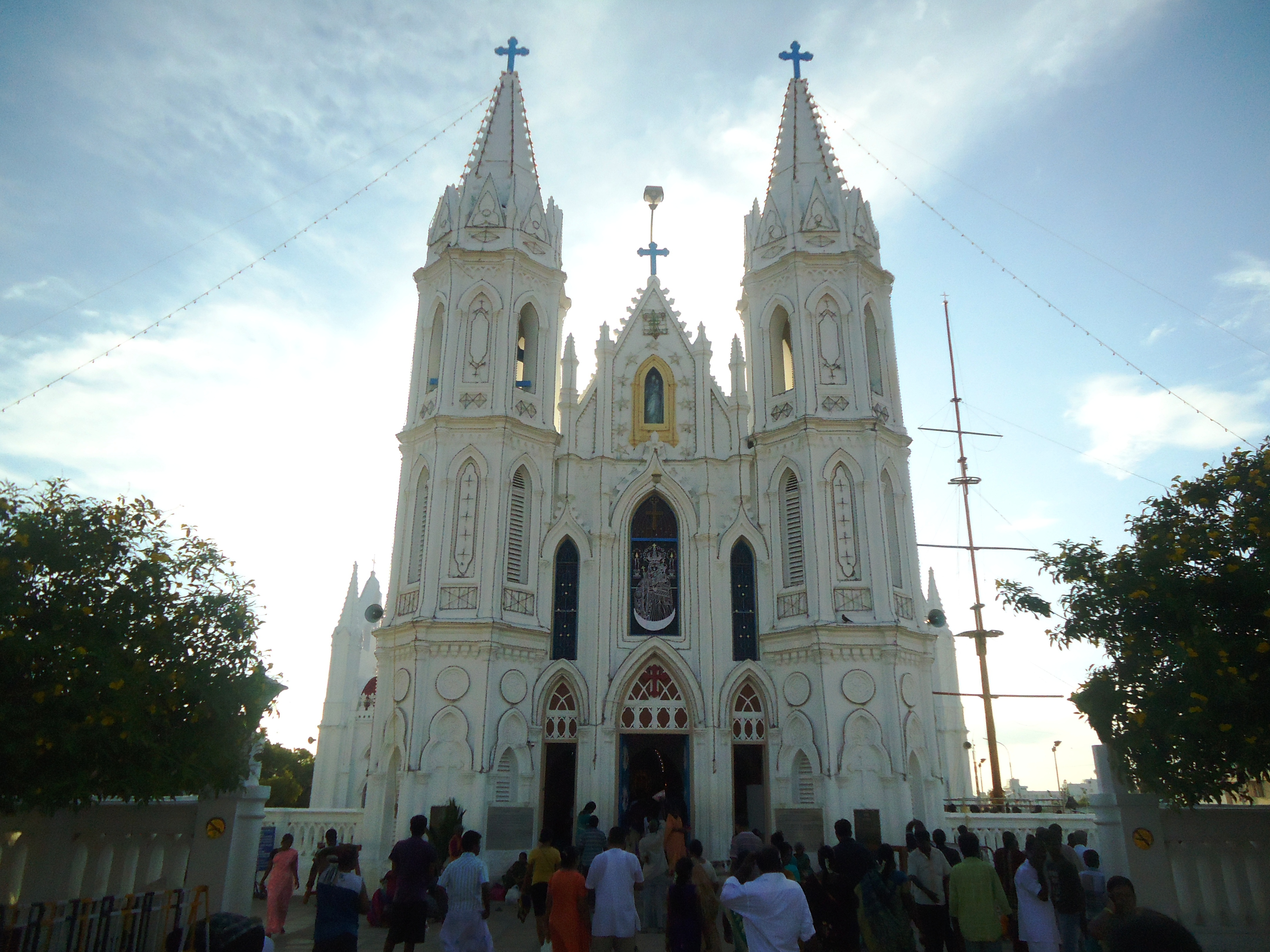 shrine velankanni,tamilnadu